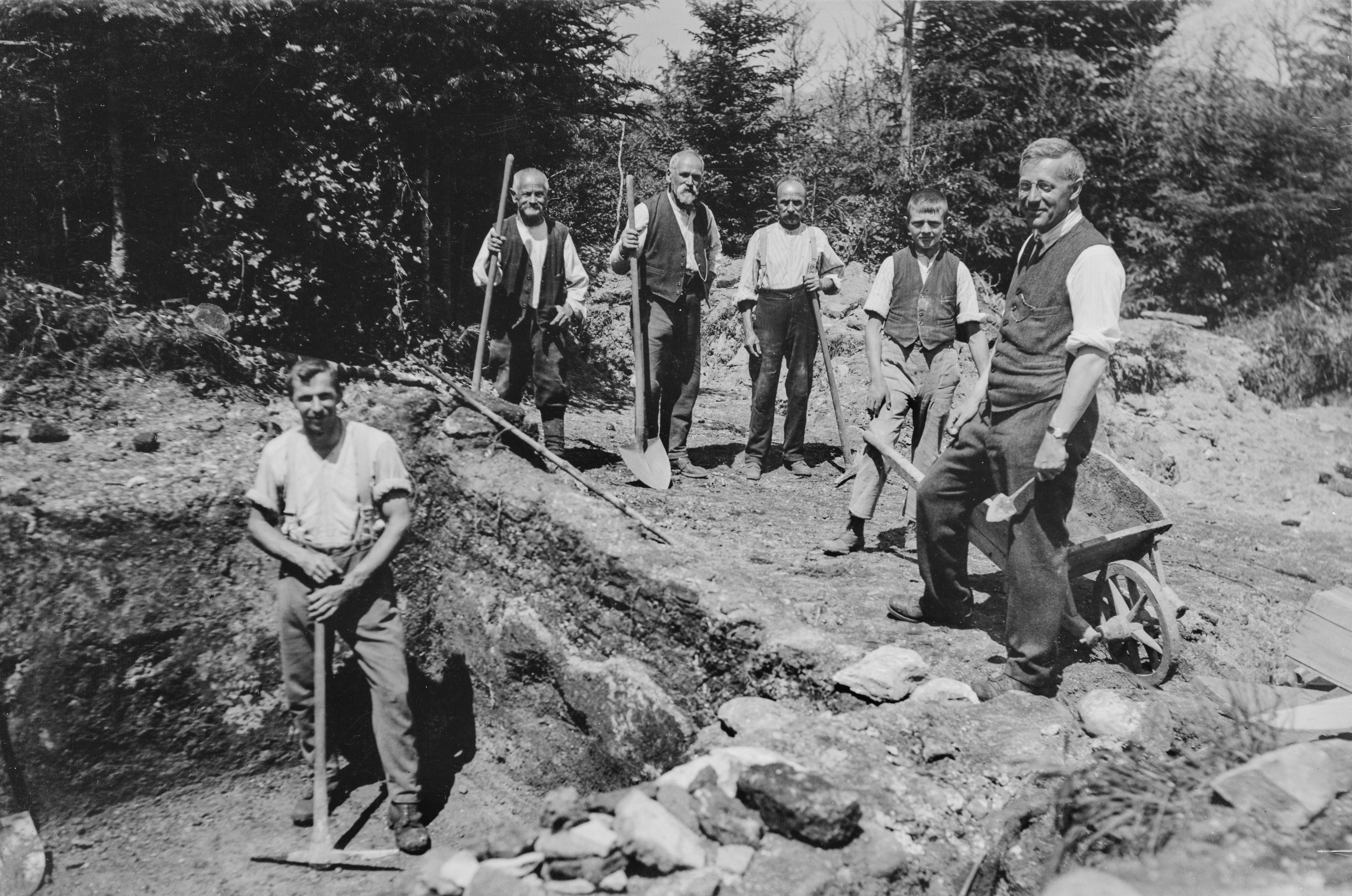 Bildarchiv der Kantonsarchäologie Aargau Kürzel/FotoNr.: Sar.26.1.2 Archiv Nr. Col./Dig.: 86065 Objekt: Römische Villa Lage: Sarmenstorf, Murimooshau Aufnahmedatum: 1927 Zeitgenössische Beschriftung: Die Ausgräber, von links nach rechts: "Jos. Stutz, Köchli, Victor Stutz, Widmer, Saxer, Bosch". Ausgrabung: Mit Hilfe von 6 Arbeitern begann Reinhold Bosch am 6. Juni 1927 mit der Freilegung der römischen Baureste. Die Ausgrabung und die unmittelbar daran anschliessende Teilkonservierung dauerte bis Ende August 1927. Im Juni 1929 wurde dann die römische Badeanlage restauriert und konserviert. Datierung des Befundes: Die Keramikreste und andere Kleinfunde lassen vermuten, dass diese Anlage um die Mitte des 1.Jh. erbaut, im 2.Jh. durch das Bad erweitert und noch vor 200 durch Brand zerstört worden ist." Literatur: - Bosch, Reinhold - Die römische Villa in Murimooshau (Gemeinde Sarmenstorf, Aargau). ASA N.F. 32, 1930, 15-25; - Bosch, Reinhold - Die römische Villa im Murimooshau. Heimatkunde aus dem Seetal 32, 1958, 3-15; - Bosch, Reinhold - Archaelogische Denkmaeler Sarmenstorf. Grabungstagebücher, Notizen, Publikationen (Abschrift/Transkription des Grabungstagebuches "G"), 18, 22-54, 59-68, A7-A19, A21-A23; - Drack, Walter / Fellmann, Rudolf - Die Römer in der Schweiz (Jona 1988) 498-499